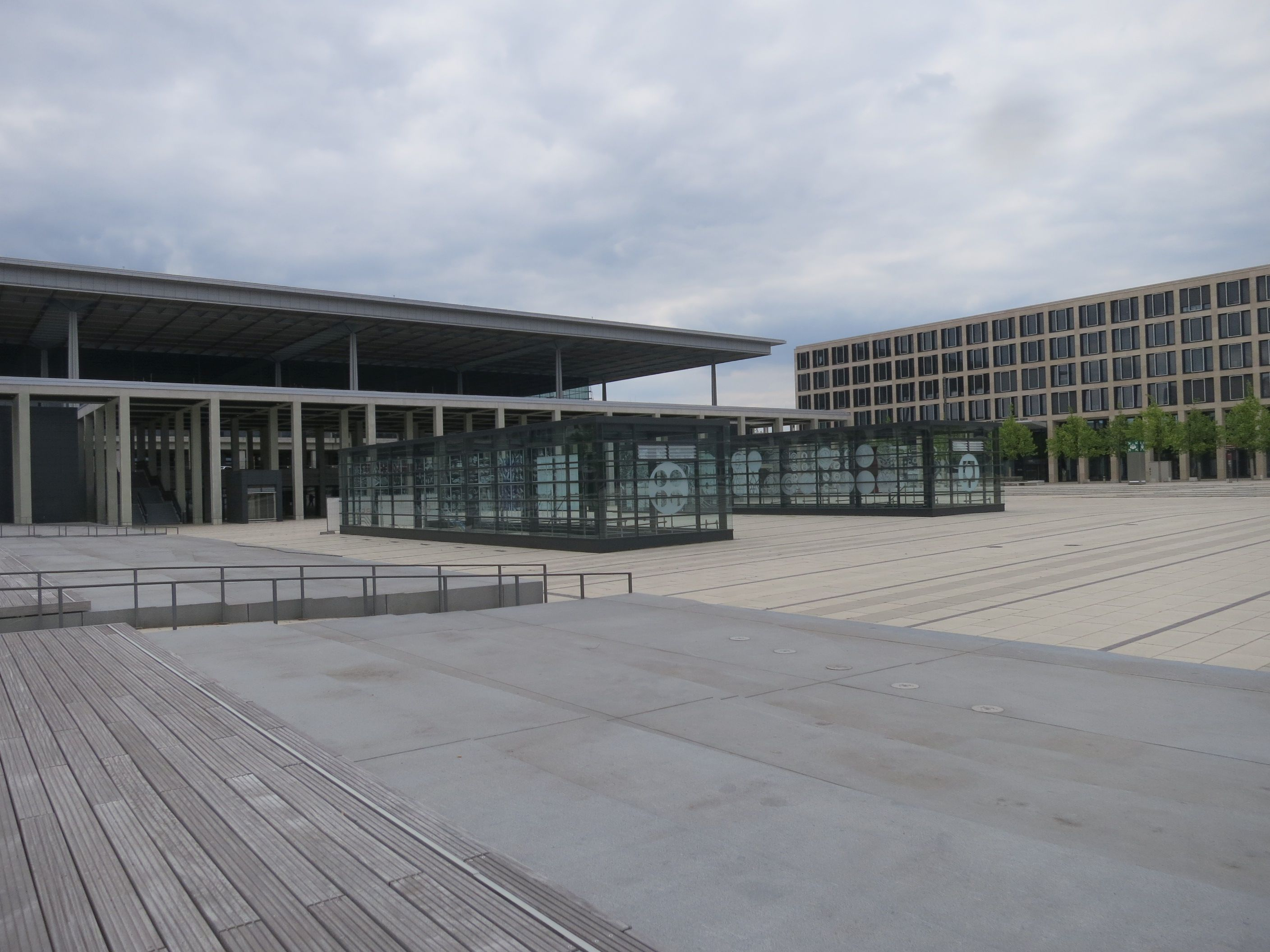 Bahnhof Flughafen Berlin Brandenburg, Vorplatz mit Zugangstreppen und BER-Terminal